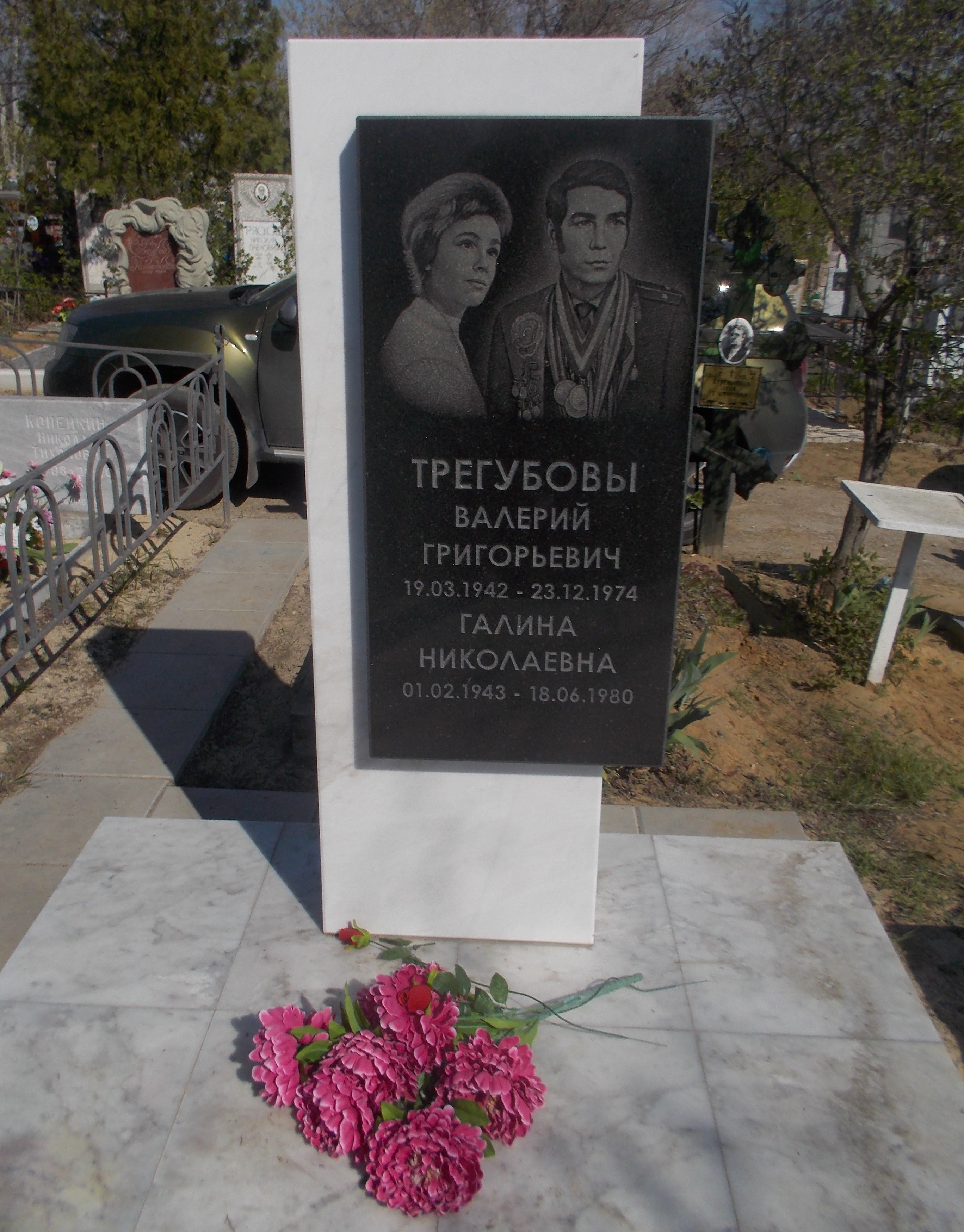 Могила В. Г. Трегубова на Дзержинском кладбище города Волгограда.